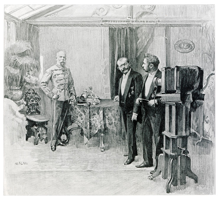 A király Koller Károly műtermében. Halmi Artúr rajza. A Király könyve (a király 50 éves uralkodói jubileumára készült kiadvány) illusztrációja. A képen a király mellett Koller utódai Forché Román és Gálfy István láthatók